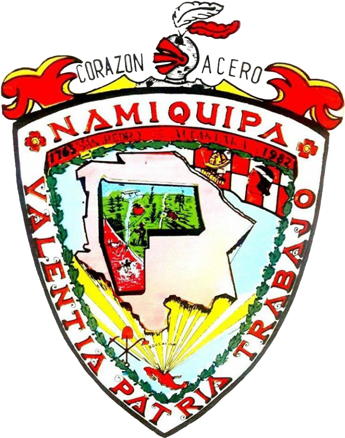 Escudo del Municipio de Namiquipa, Chihuahua, México